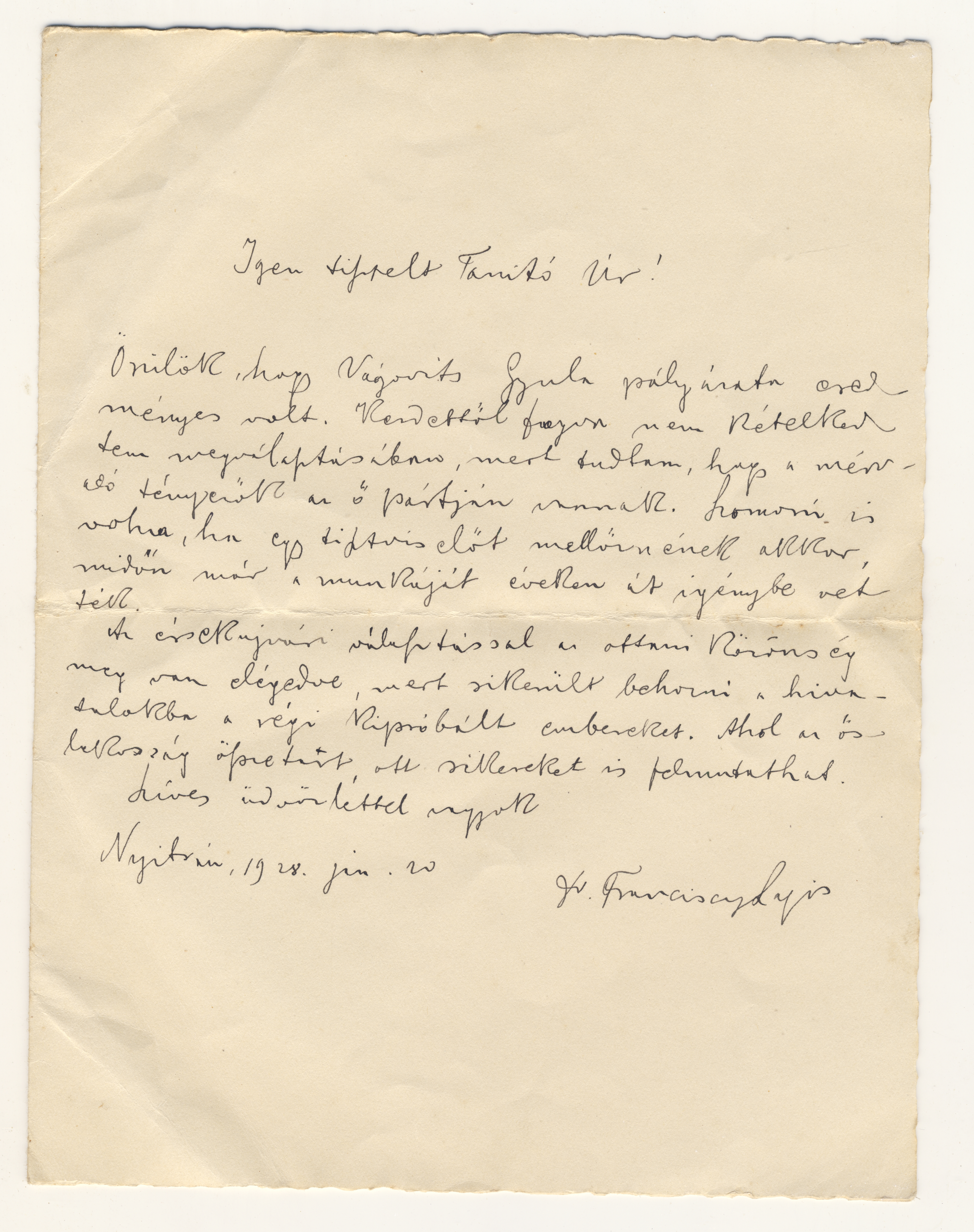 Franciscy Lajos levele Vágovits Gyula ügyéről Csiffáry Jenő kántortanítónak (Csiffáry Jenő hagyatéka)